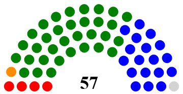 composicion de la Asamblea en ese periodo